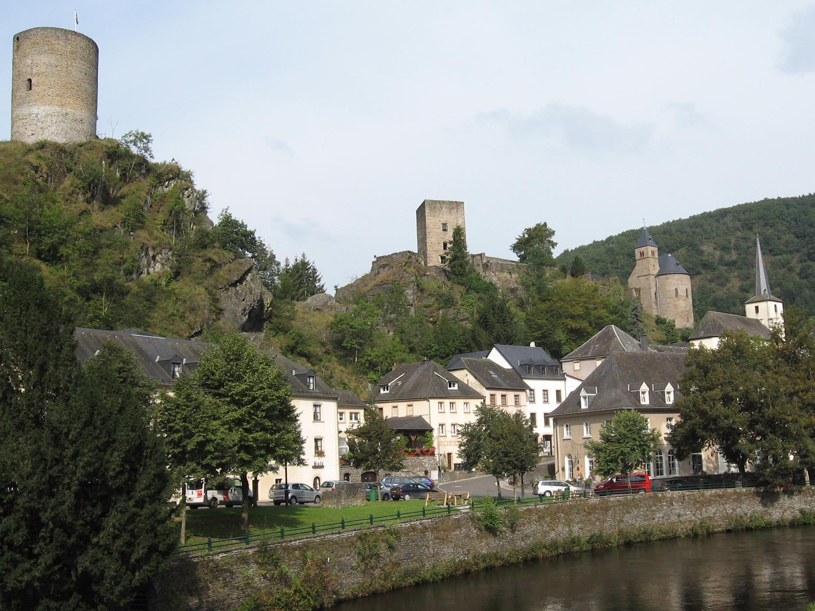 Esch-sur-Sûre plaats